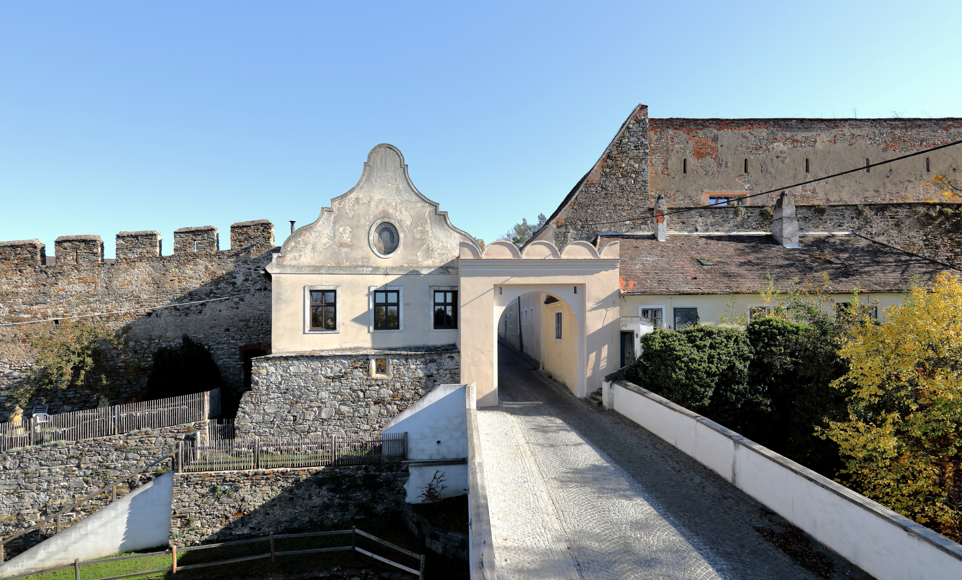 Das Raabser Tor mit der westseitigen Stadtbefestigungsmauer in Drosendorf, ein Ortsteil der niederösterreichischen Stadt Drosendorf-Zissersdorf. Links davon das denkmalgeschützte Bürgerhaus mit der Adresse Raabser Tor 10 und rechts das Untere Torwärterhaus mit der Adresse Raabser Tor 3.